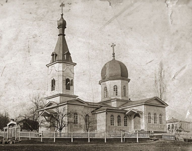 Псекупская. Войсковой храм Святителя Николая